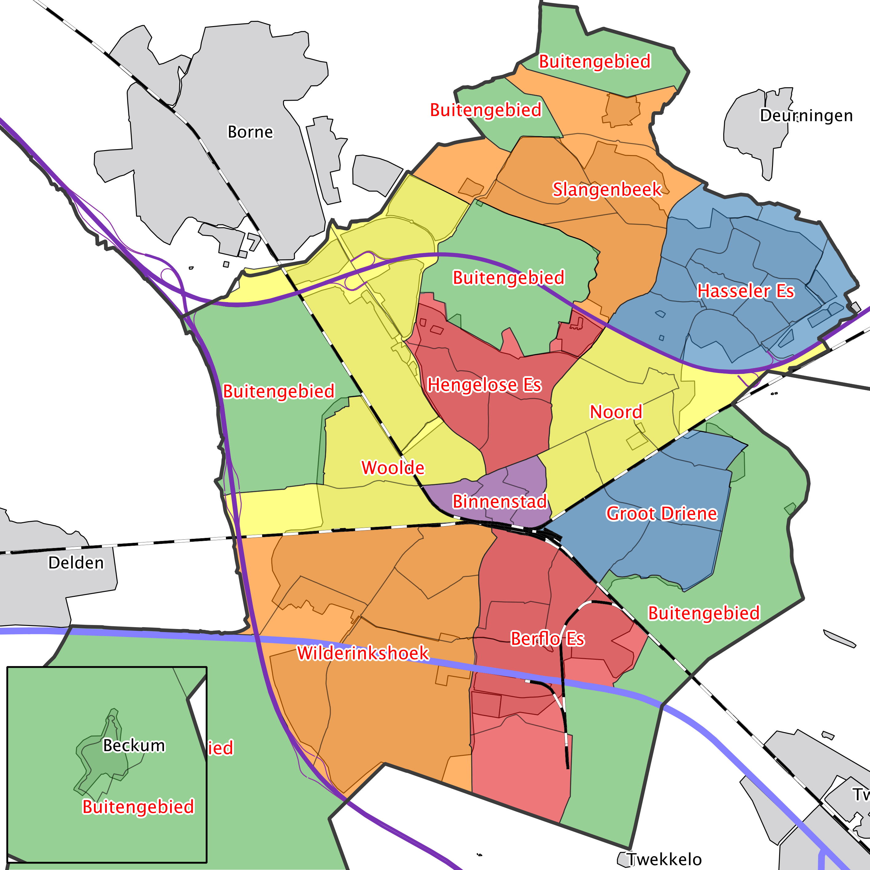 Wijkindeling van de gemeente Hengelo. Kaart samengesteld op basis van OpenStreetMap data (vrijgegeven onder de Open Data Commons Open Database licentie) en gegevens over wijk- en buurtindeling van de gemeente Hengelo (Open Data en vrijgegeven onder de Creative Commons Naamsvermelding 3.0 Nederland licentie)